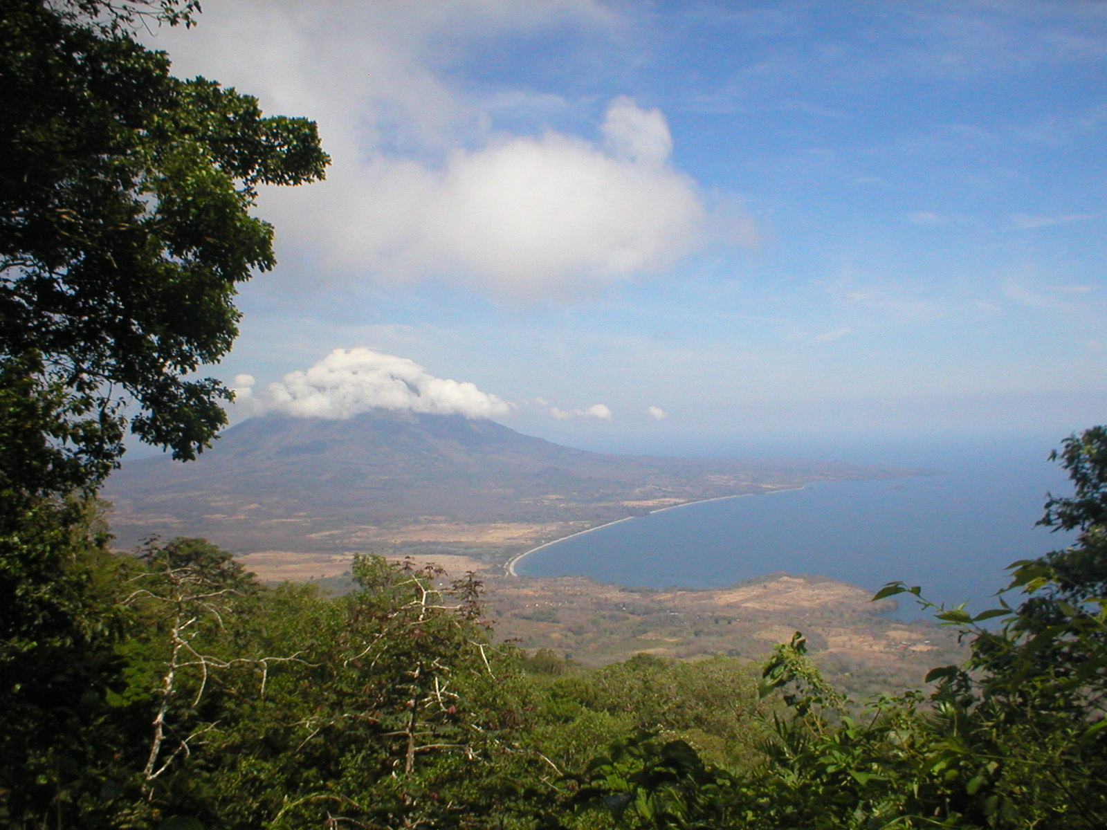 Concepción (volcano) from Maderas (volcano), in Nicaragua